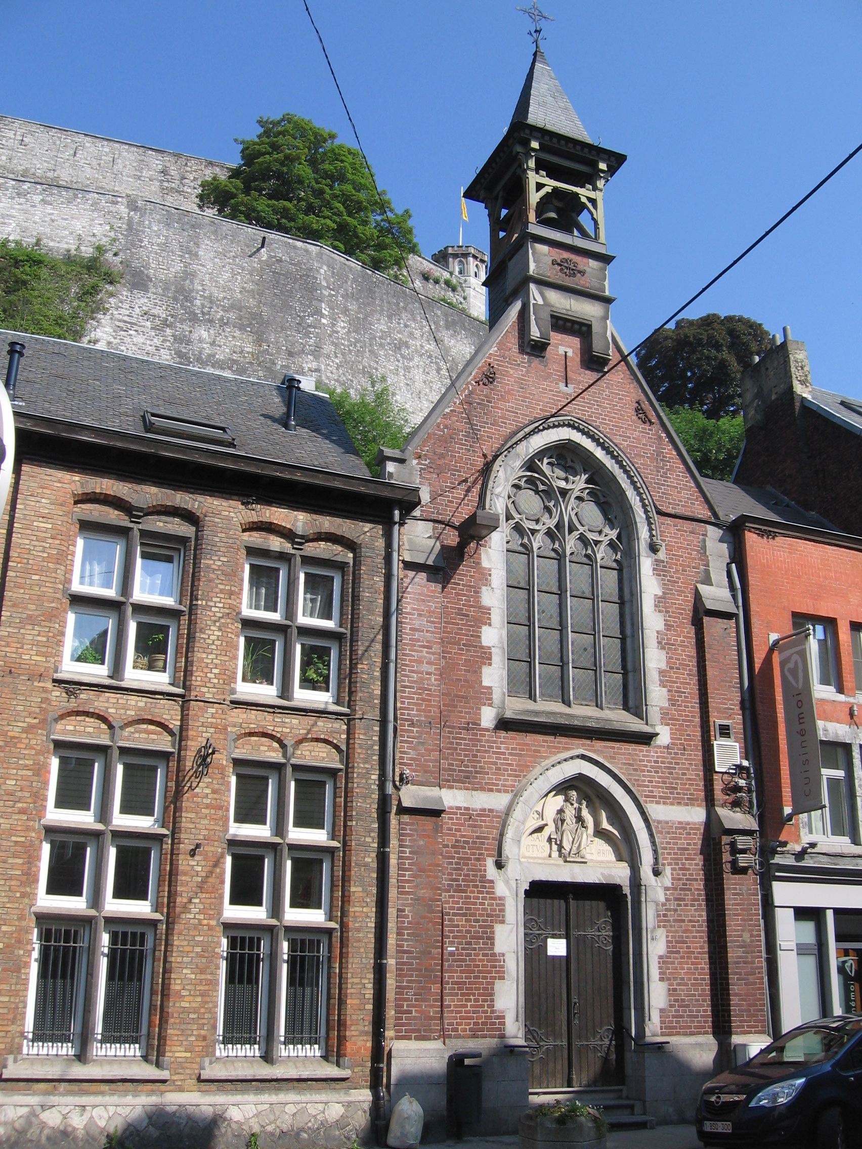 La chapelle Saint-Materne, cosntruite en 1899, se trouve au pied de la citadelle de Namur (rue Notre-Dame), en Belgique.